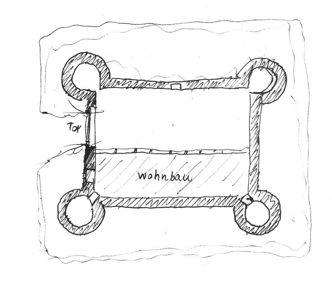 Entenburg in Pfohren, Grundriss